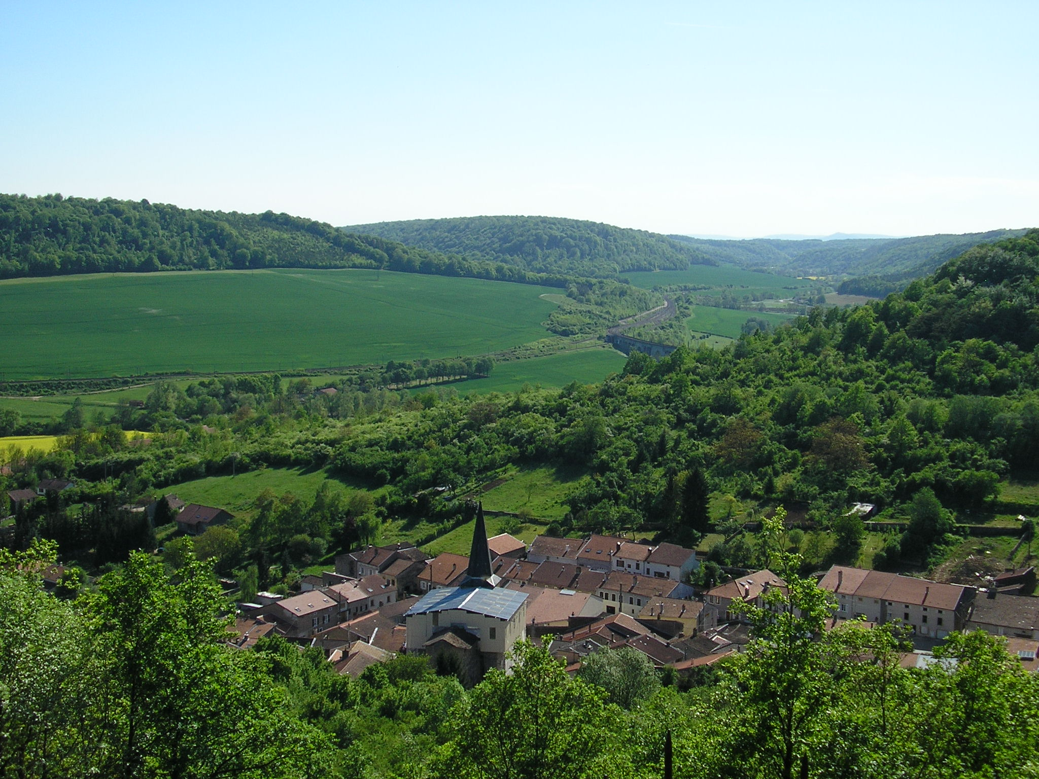 Waville vu de la Croix de Joyeuse